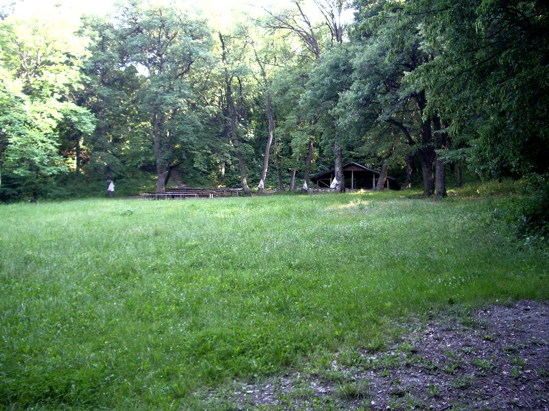 Автор на снимката е Ивайло Писков.